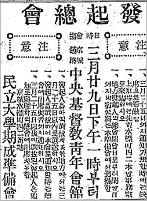 ko:1923년 ko:3월 20일자 동아일보에 실린 민립대학설립운동 광고